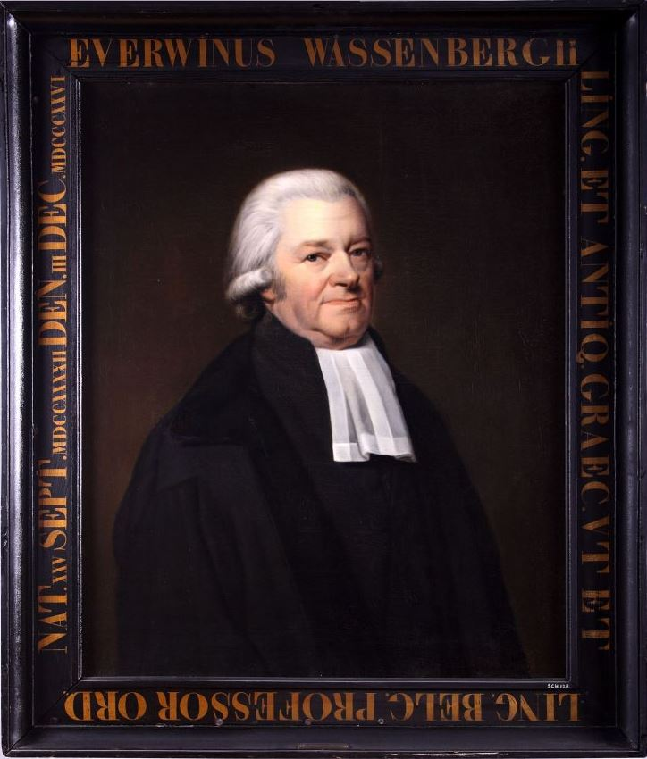 Portret in olieverf van Everwinus (Everwijn) Wassenbergh, professor Grieks aan de Franeker universiteit van 1771 tot 1811, en professor Grieks, Nederlands en Fries van 1815 tot 1826. Dit schilderij is een kopie naar een origineel door Willem Bartel van der Kooi. Everwinus Wassenbergh (Lekkum 25 september 1742 - Franeker 3 december 1826). Wassenbergh studeerde in Franeker en Leiden en was hoogleraar in Deventer en Franeker. (tekst Museum Martena)